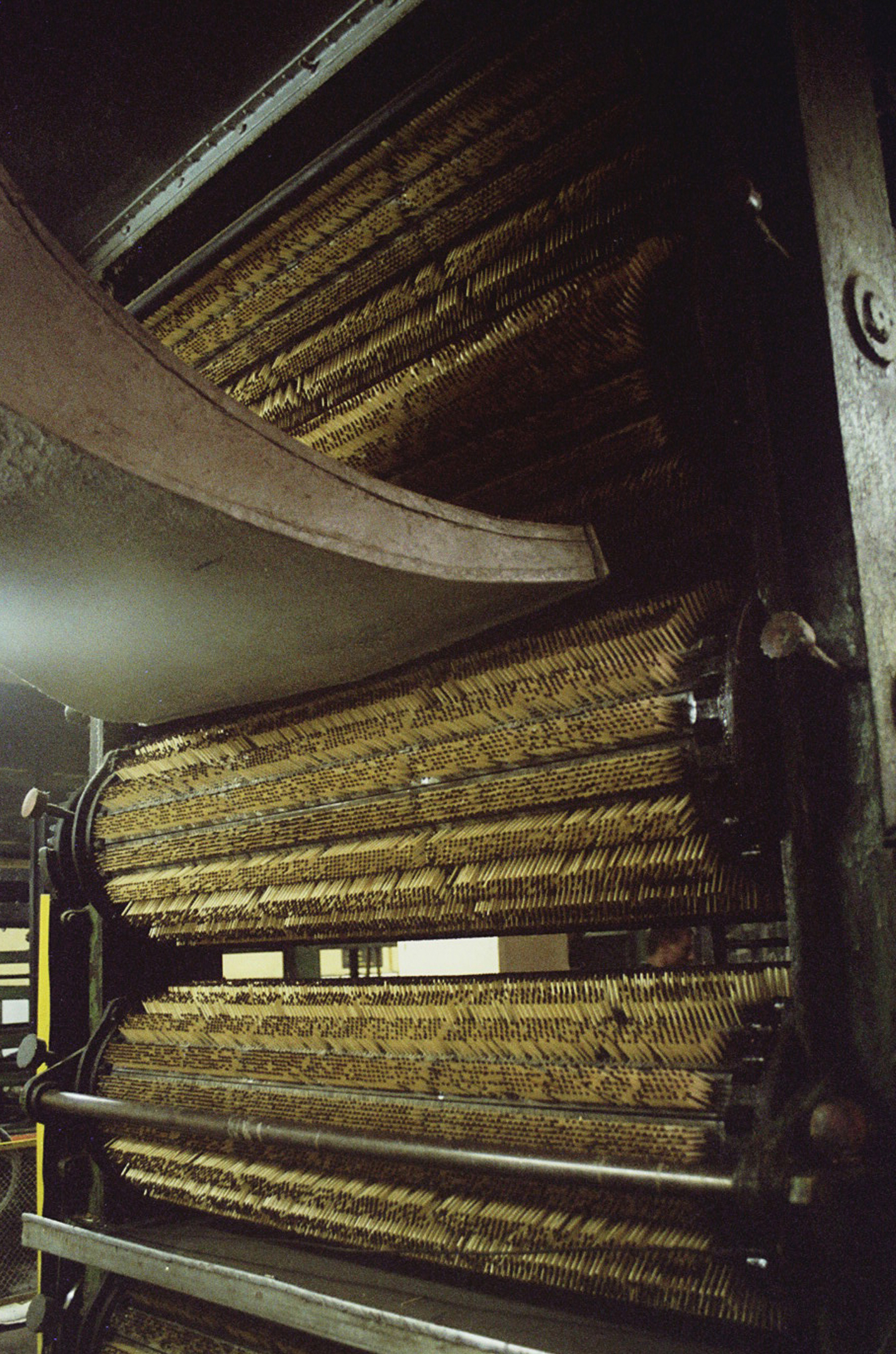 Muzeum produkcji zapałek w Częstochowie - Suszenie zapałek Author: Przykuta Date: december 2005